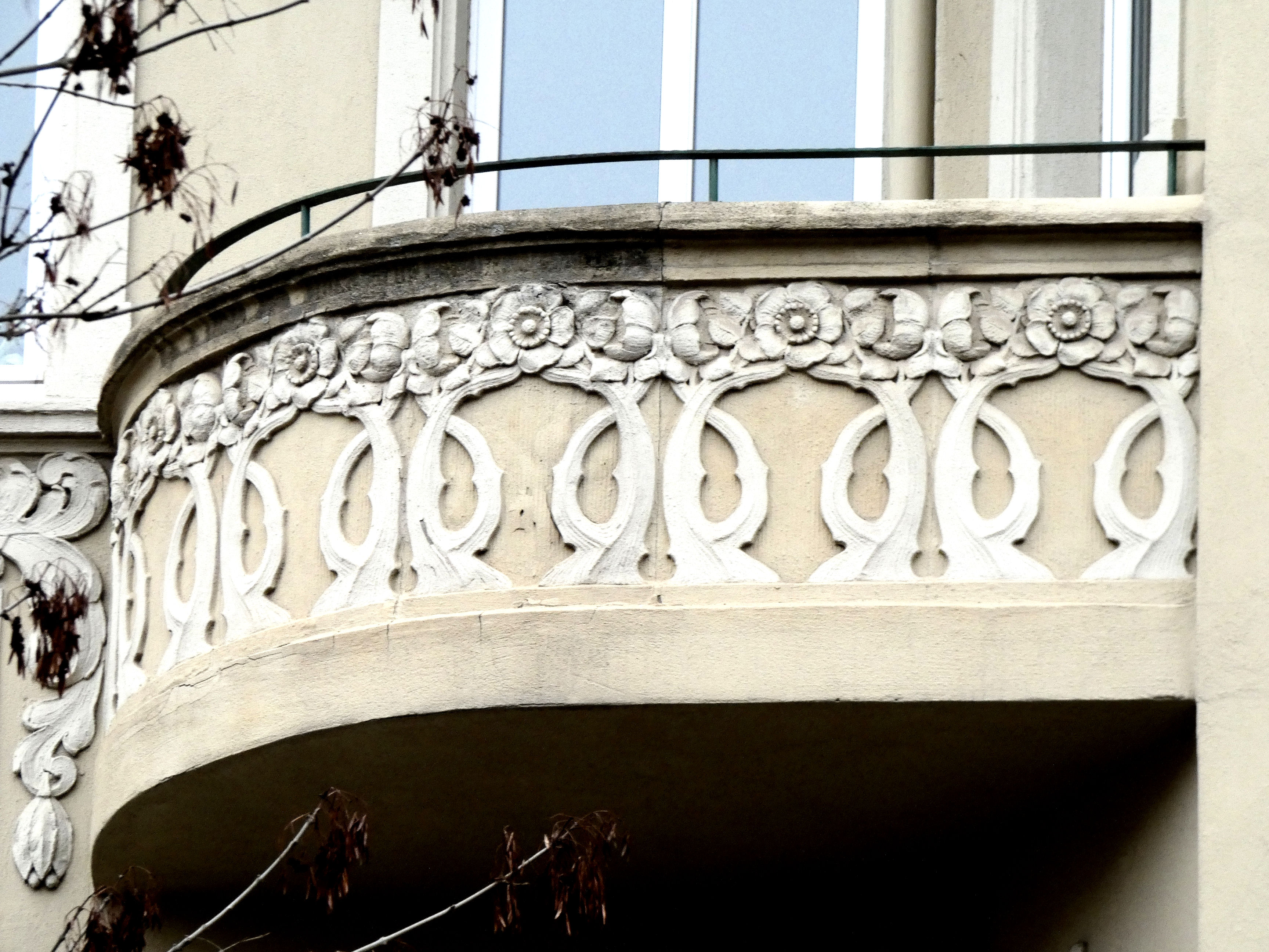 Balkon am Haus Richard-Wagner-Straße 22, Halle (Saale)